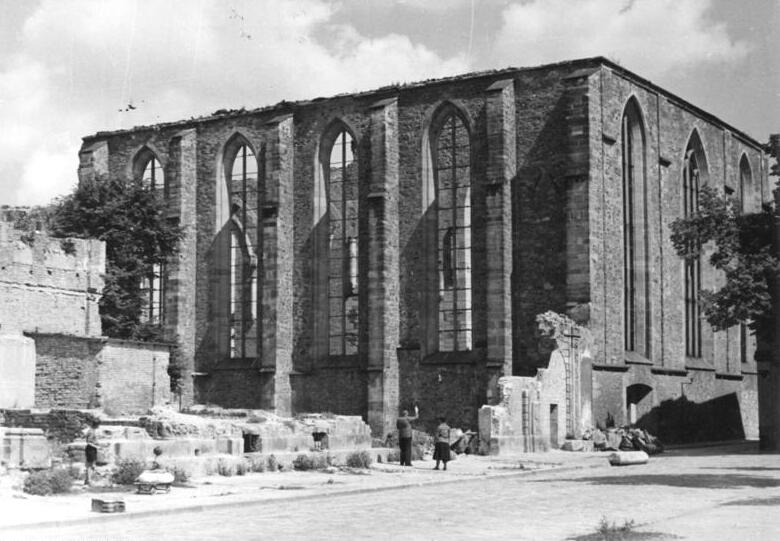 Magdeburg, Nicolai-Stifts-Kirche, Ruine Zentralbild Biscan Len-Ho. 7.8.1952 Bergung kulturgeschichtlicher Schätze in Magdeburg Die unter Leitung des Heimatforschers Werner Priegnitz stehende Stadtgeschichtliche Forschungsstelle in Magdeburg hat die Aufgabe, das geschichtliche Baugut im Trümmerfeld der Stadt aufzunehemen und kulturgeschichtliche Bauteile zu bergen. Im Laufe ihrer mehrjährigen Arbeit haben die Mitarbeiter dieser Forschungsstelle unter den Trümmern des zerstörten Stadtzentrums viele wertvolle Funde gemacht. Unter anderem sind sie auf die große unterirdische Halle in der Buttergasse gestossen, die heute von der Deutschen Akademie der Wissenschaften bearbeitet wird. Unser Bildbericht schildert die Arbeit der Forschungsstelle. UBz: Die Ruine der ehemaligen Nicolai-Stifts-Kirche, die zur Zeit Sammelplatz für die in den Trümmern aufgefundenen Architekturteile ist und später einmal ein Freilichtmuseum werden soll.